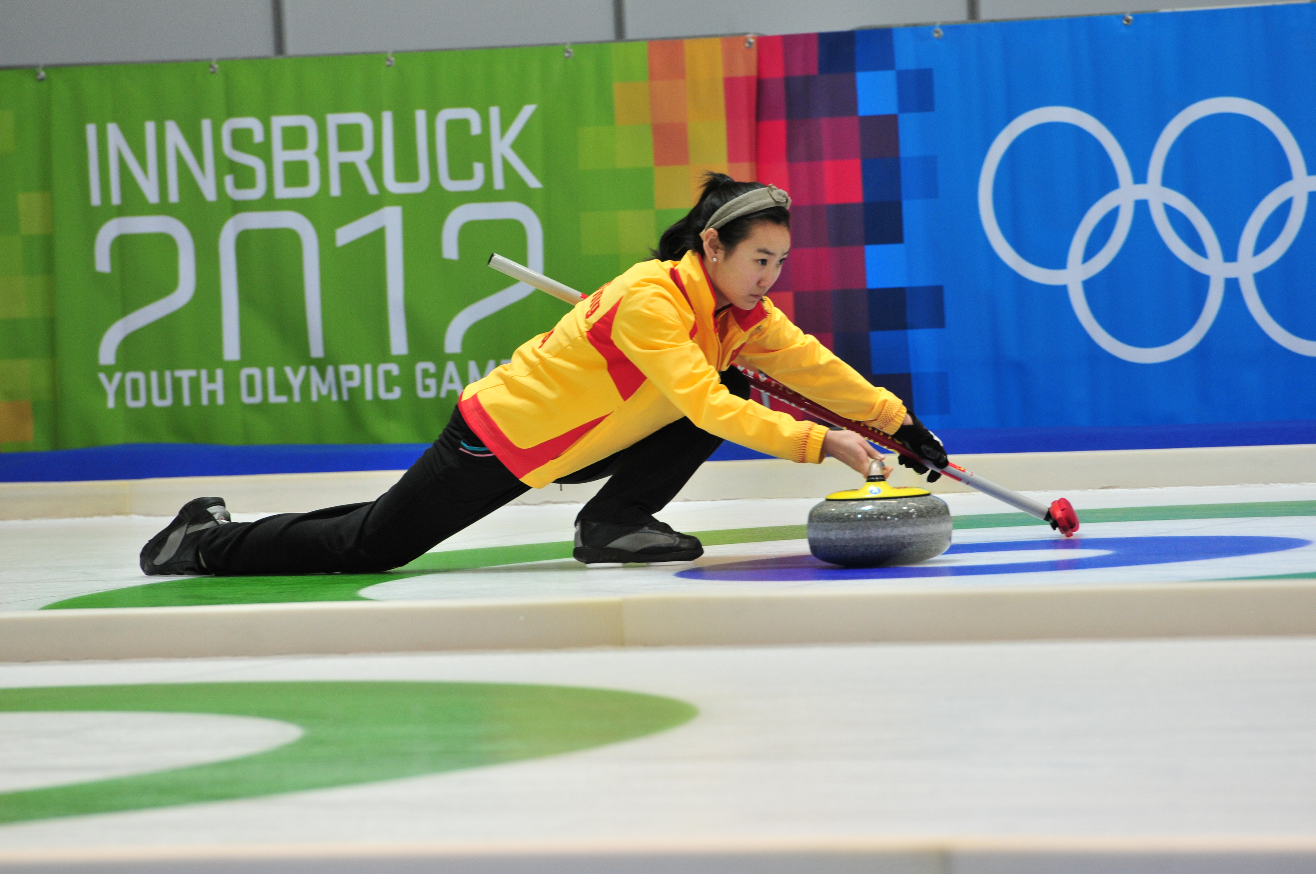 1. Jugendolympiade 2012 Innsbruck Erste Olympische Jugend- Winterspiele 201213. bis 22. Jänner in Innsbruck Dieses Foto wurde durch die Unterstützung von Wikimedia Österreich und die Twoonix Software GmbH ermöglicht.